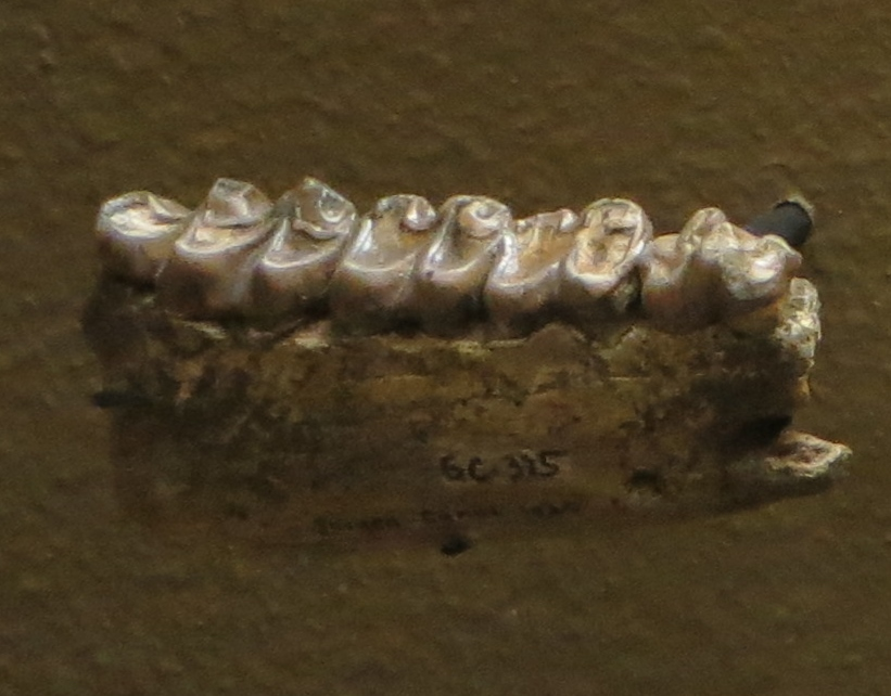 Fossil of Diplobune - Took the picture at Natural History Museum, Basel